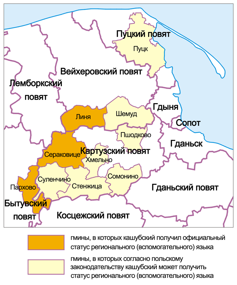 Статус кашубского языка на территории Поморского воеводства в гминах с численностью носителей кашубского более 20 % (на 2012 год). Гмины, в которых кашубский язык официально признан как региональный (вспомогательный), — обозначены оранжевым цветом; гмины, власти которых имеют право воспользоваться такой возможностью, — обозначены жёлтым цветом.